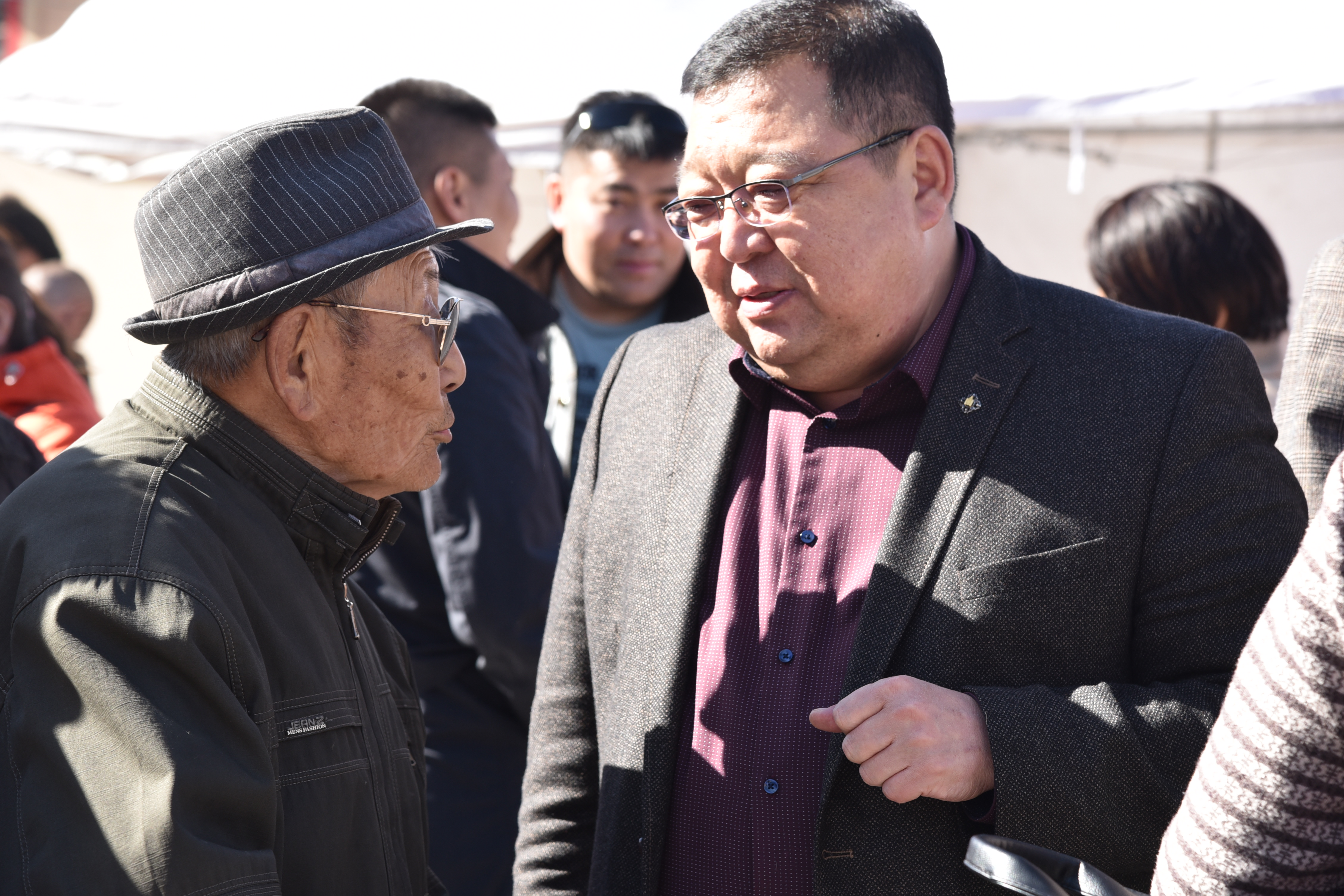 Монгол: С.Эрдэнэ нь 2012-2016 оны хооронд ХАХНХ-ын сайд байв